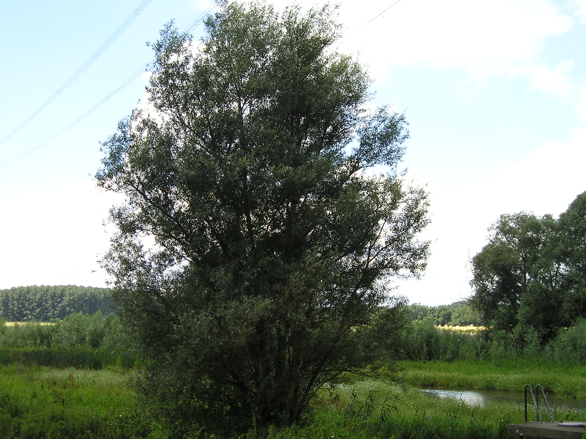 Baumberger Aue in Monheim am Rhein (Ortsteil Baumberg), Vordergrund mit Baumberger Graben im Naturschutzgebiet „Urdenbacher Altrhein und Baumberger Aue“ (NSG ME-021)